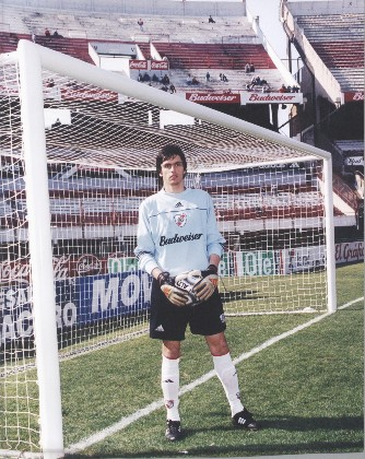 Daniel Andres Ferreyra